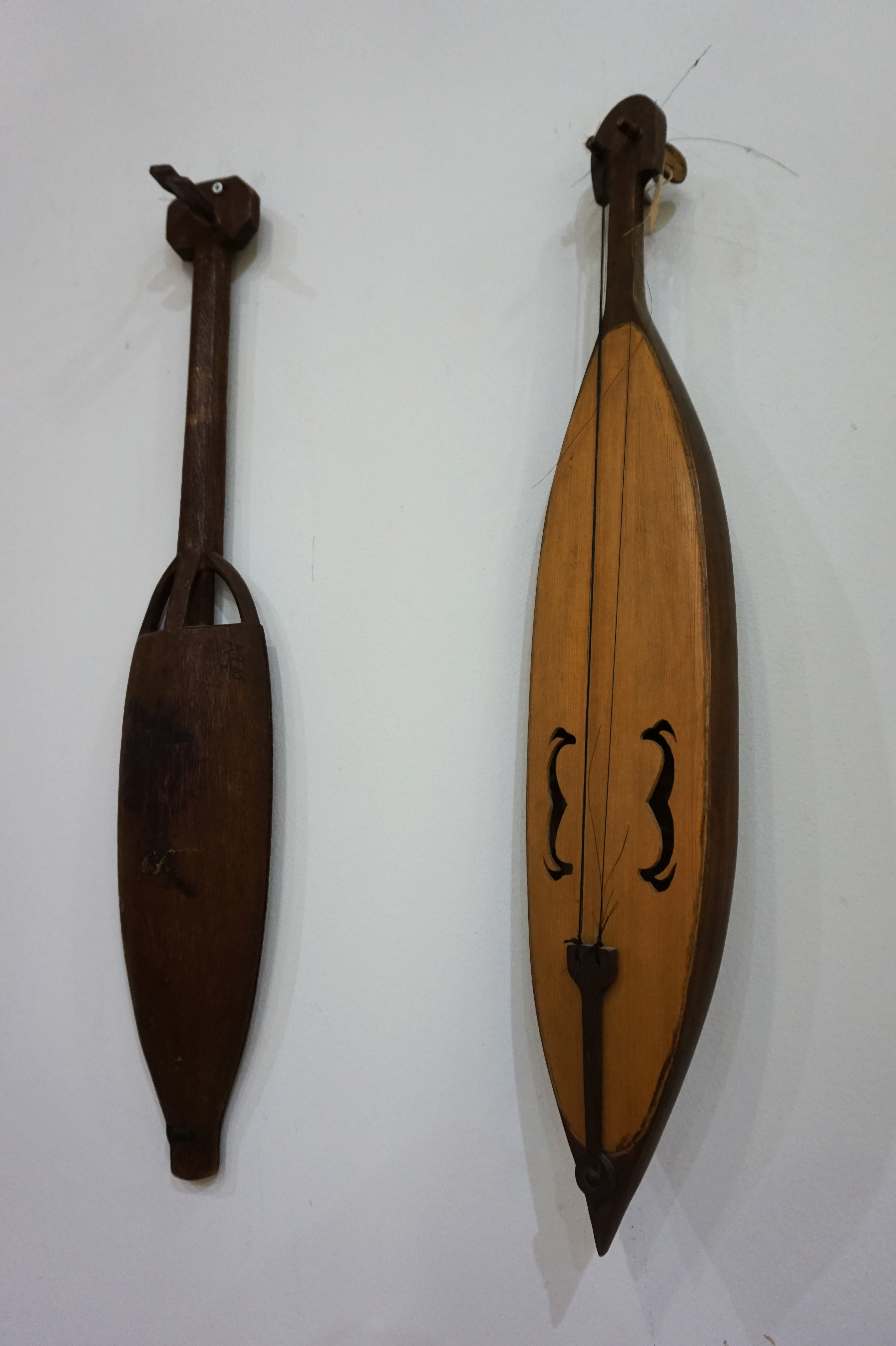 格鲁吉亚，abkhartsa。